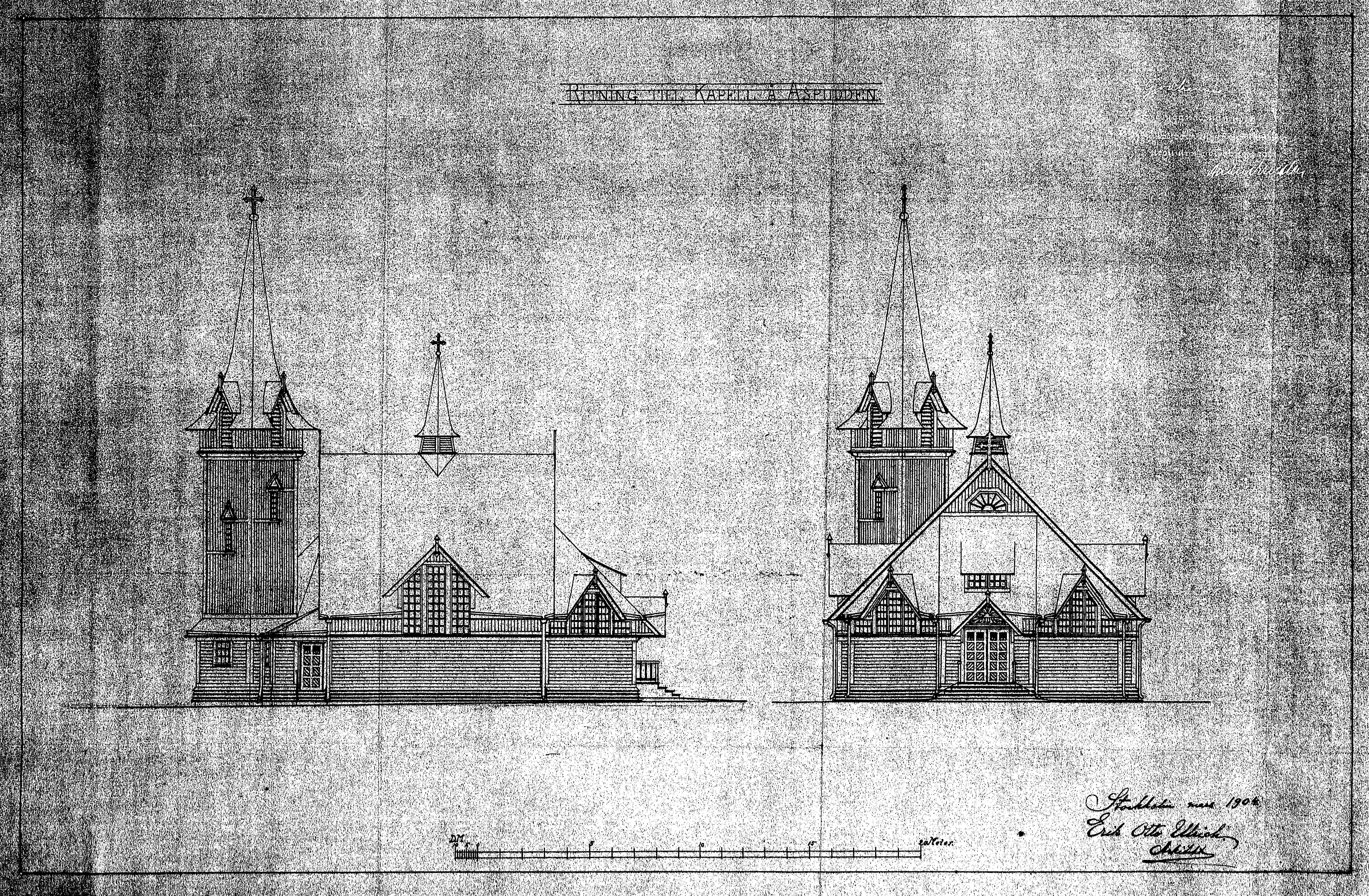 Sankt Sigfrids kyrka Aspudden, fasadritning